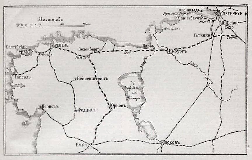 Данное изображение было использовано в статье «Балтийская линия» опубликованной в четвёртом томе «Военной энциклопедии», который был издан книгоиздательским товариществом Ивана Дмитриевича Сытина в 1911 году в столице Российской империи городе Санкт-Петербурге.